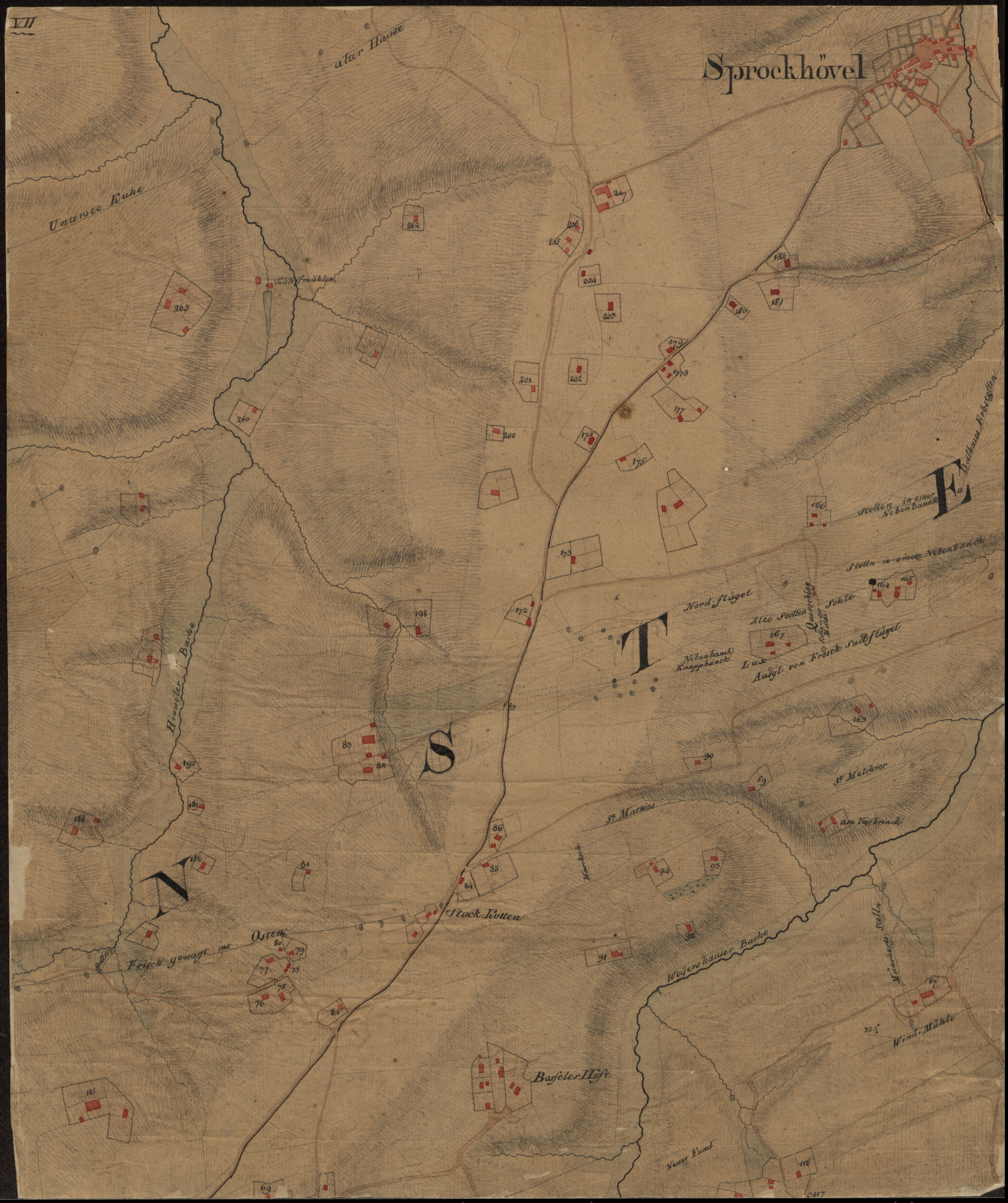 Spezialkarte des Bergwerkdistrikts Blankenstein. Nachdruck als „Carte speciale des mines“. Sprockhövel.